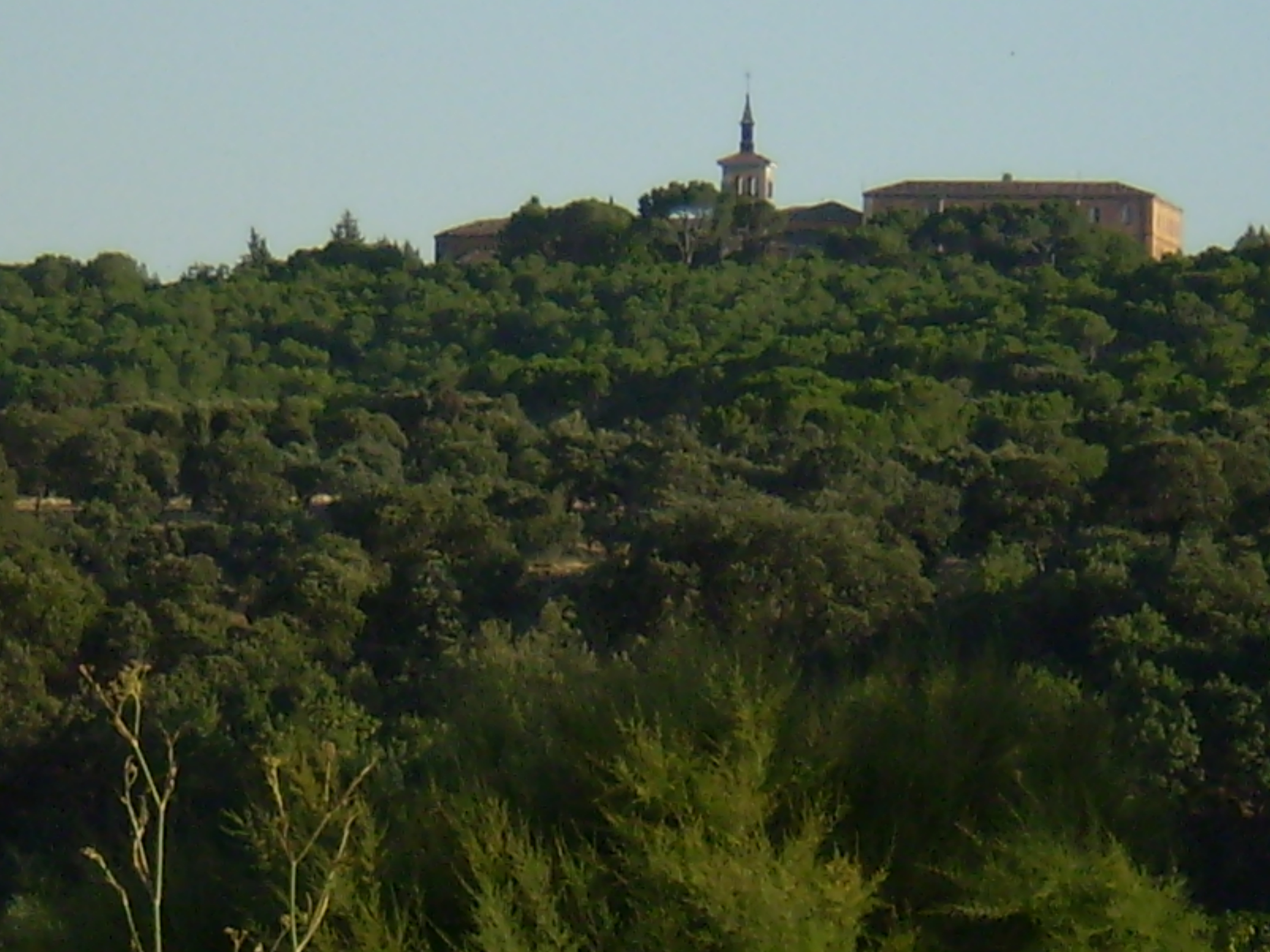 Ermita del Cristo del Pardo, Madrid, Spain